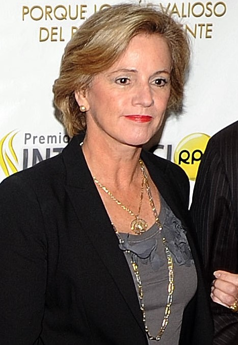 El presidente del Congreso, César Zumaeta, participó esta mañana en la ceremonia de entrega del Premio Integración 2010 de RPP Noticias. Al acto asistieron también la legisladora Lourdes Alcorta y la primera dama de la Nación, Pilar Nores de García.